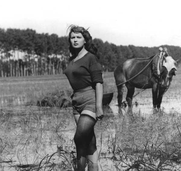 Fotogramma da Riso amaro (1949).